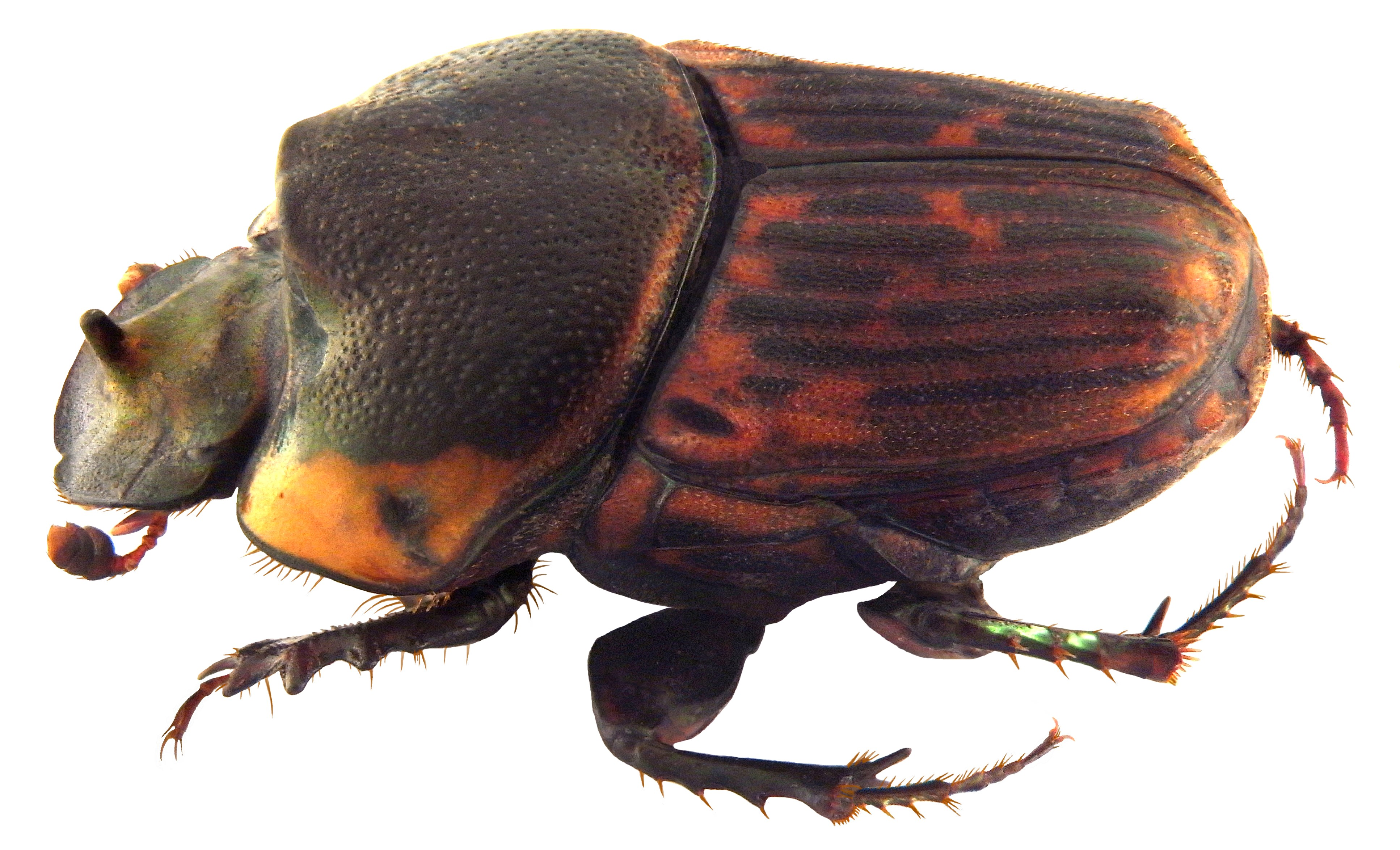 Familie: Scarabaeidae Groesse: 11,3 mm Fundort: Congo, Madingou leg. G.Onoré, 1976; det. Ph.Walter Photo: U.Schmidt, 2010